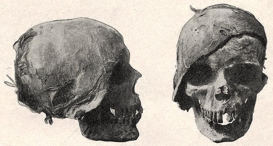 bis. — Crâne du roi Tabnit (№ 1).